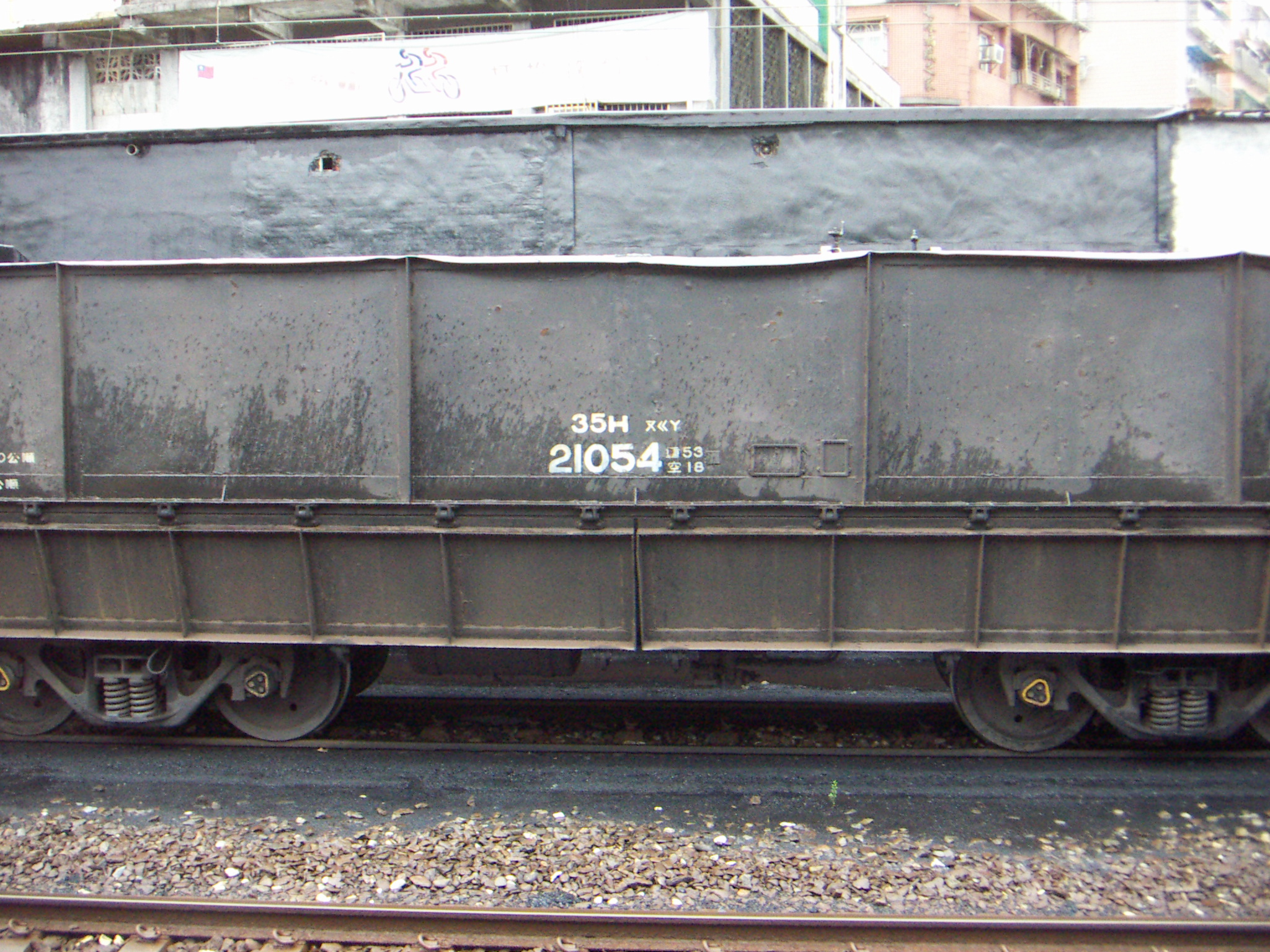 台鐵平溪線停放的貨車35H21054車側注音代碼。